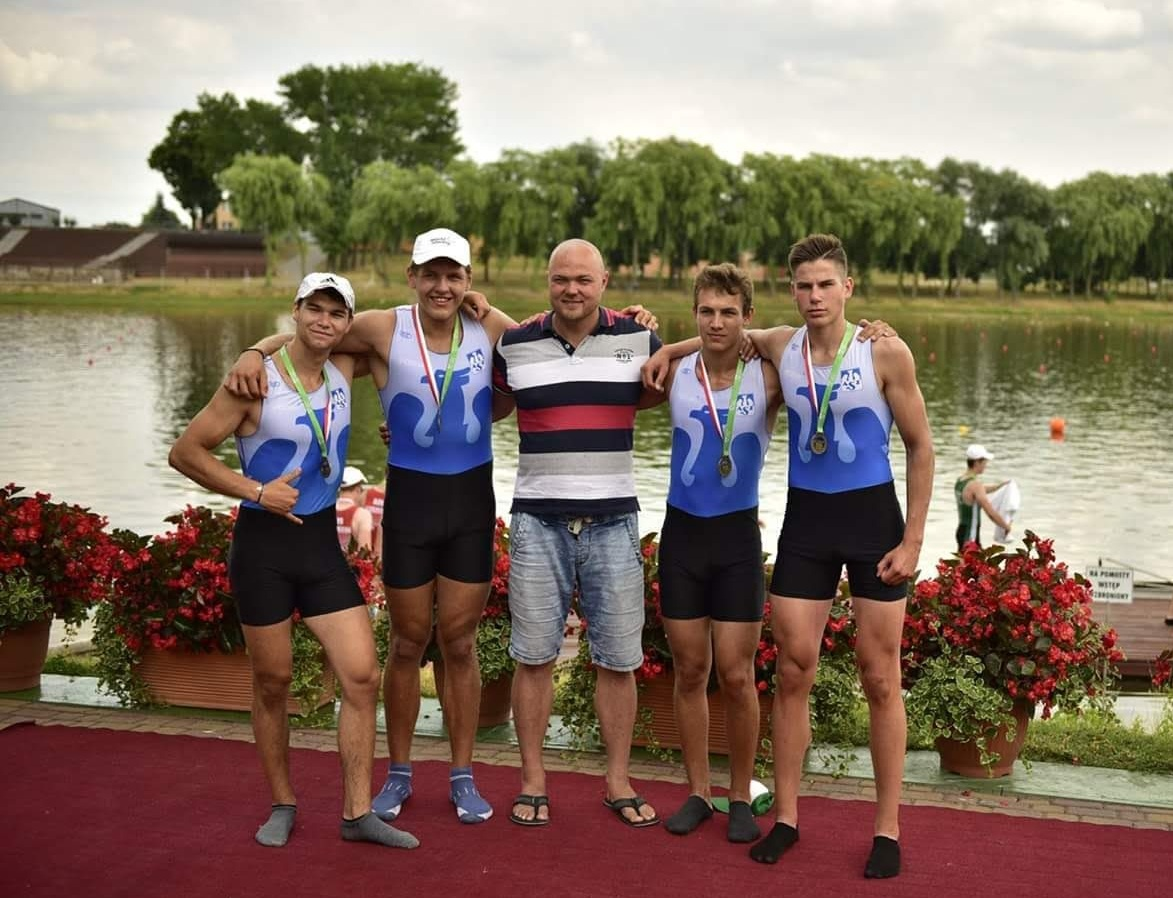 Akademiccy Mistrzowie Polski Juniorów na czwórce podwójnej z 2018 roku (Szymon Mikołajczak, Przemysław Wanat, Oskar Witczak i Cezary Litka) z trenerem Błażejem Kamolą.